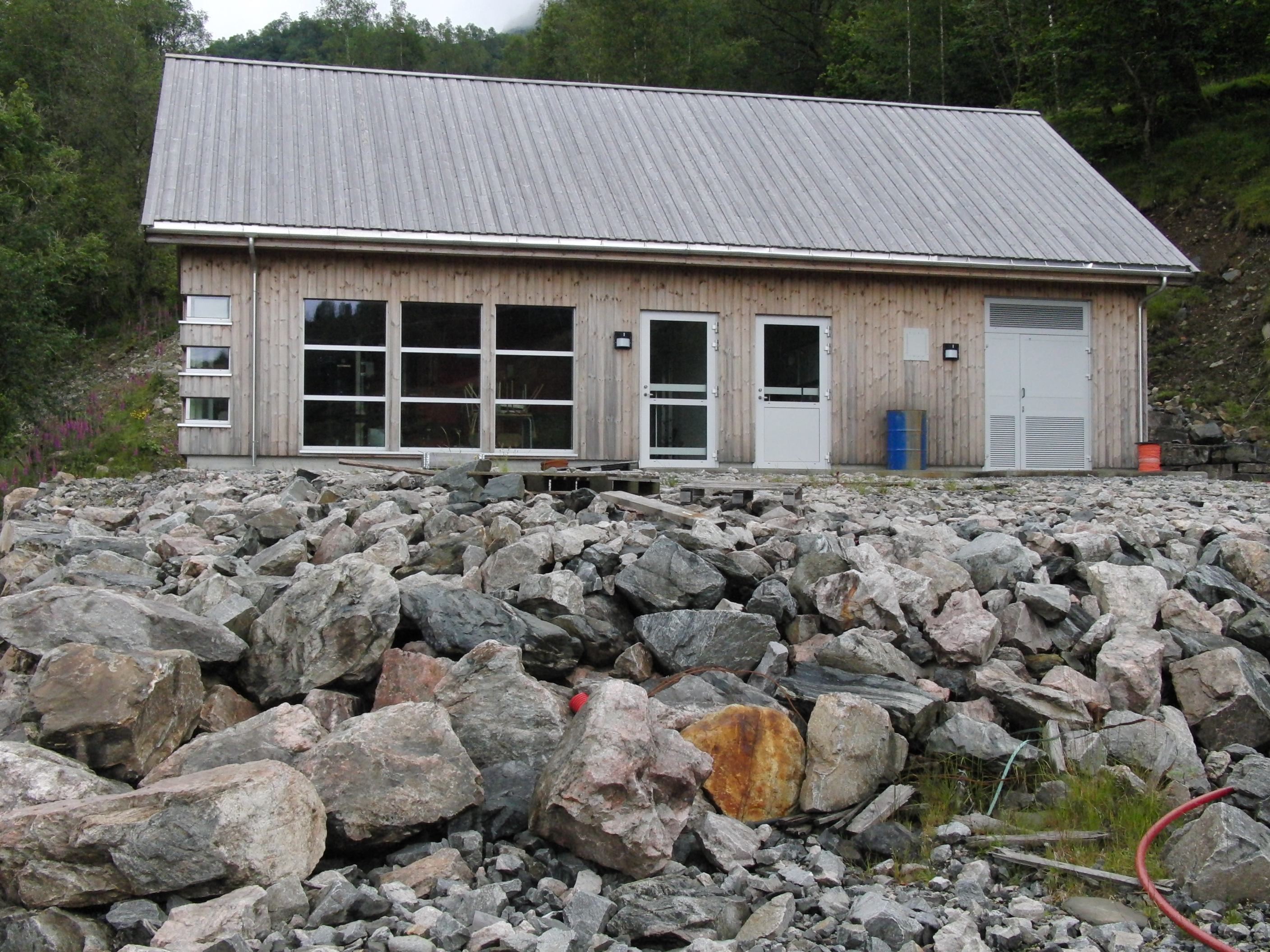 Gjønaelva kraftverk